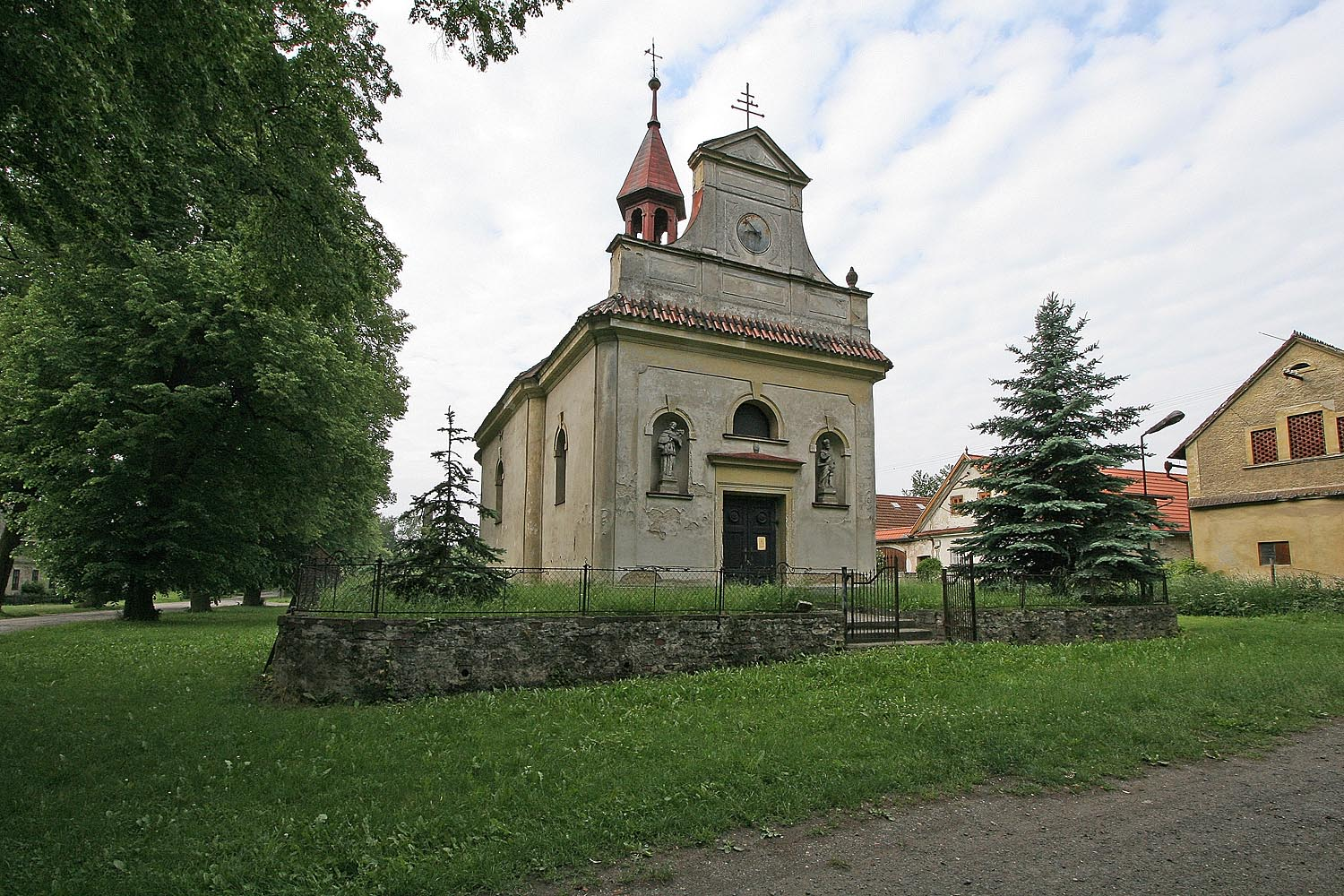 kaple Nejsvětější Trojice na Návsi v Hrušové